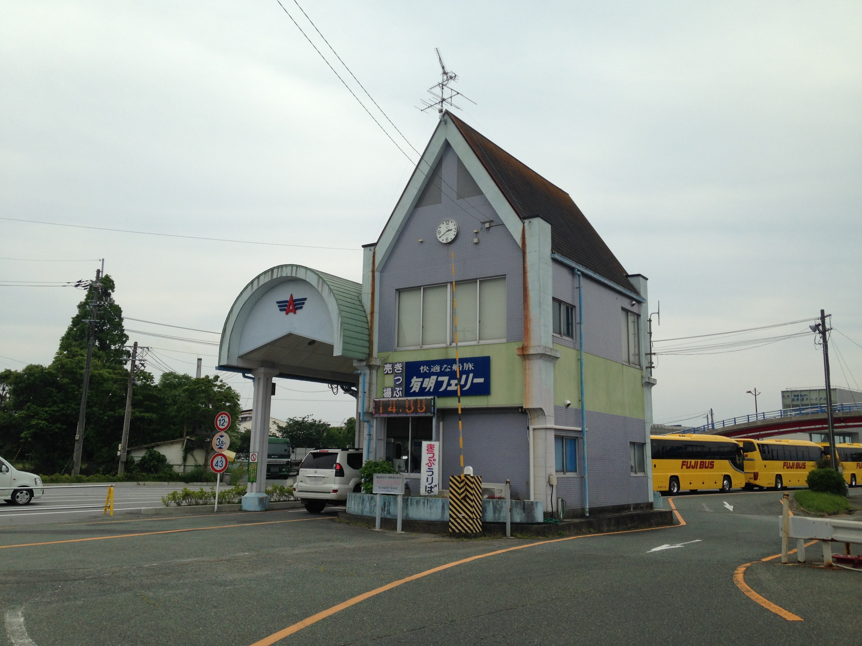 長洲港にある有明フェリーの切符売り場